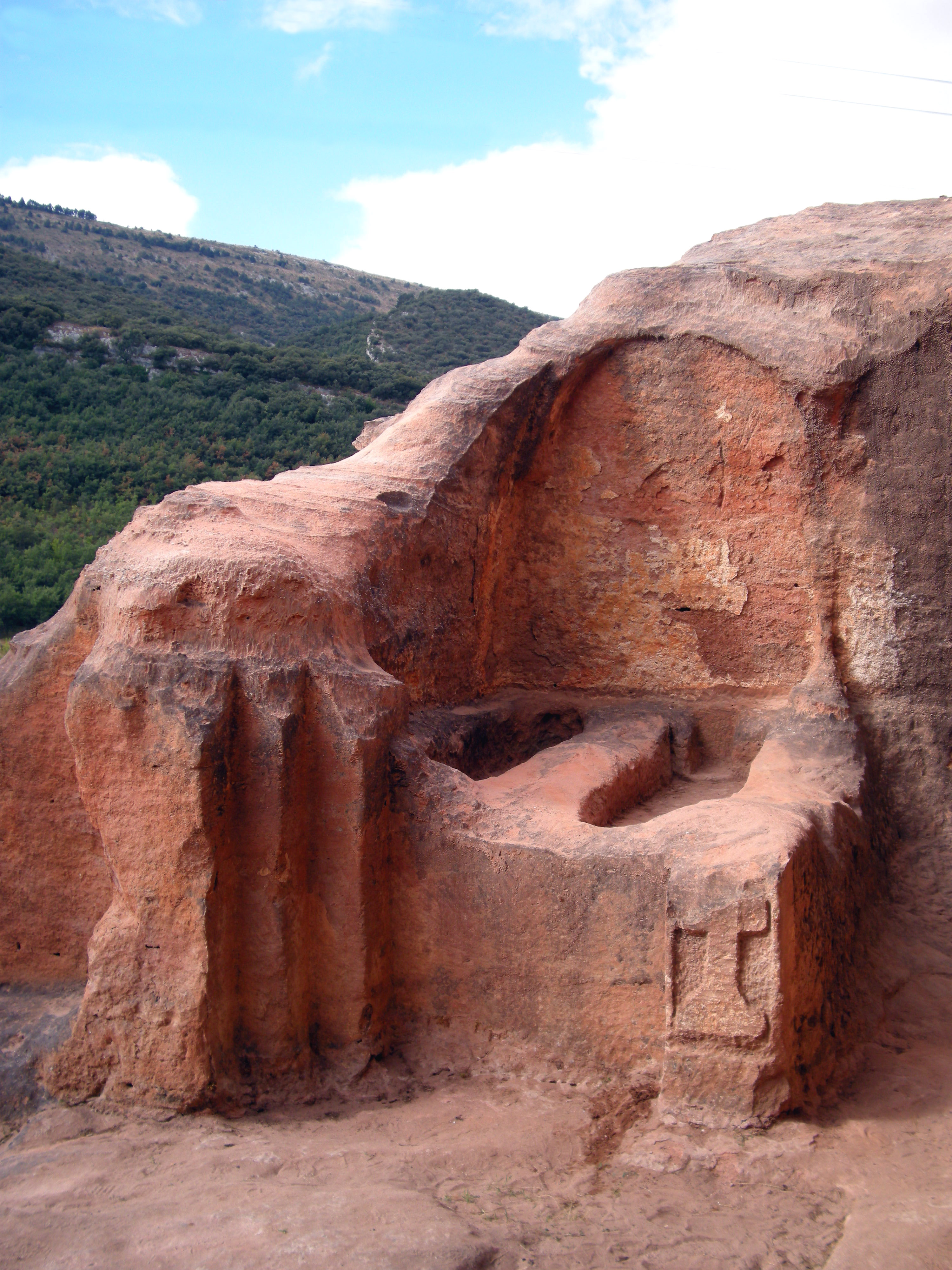 Tumbas del eremitorio de Argés. Eremitorio de San Pedro en el Valle de Manzanedo Burgos.